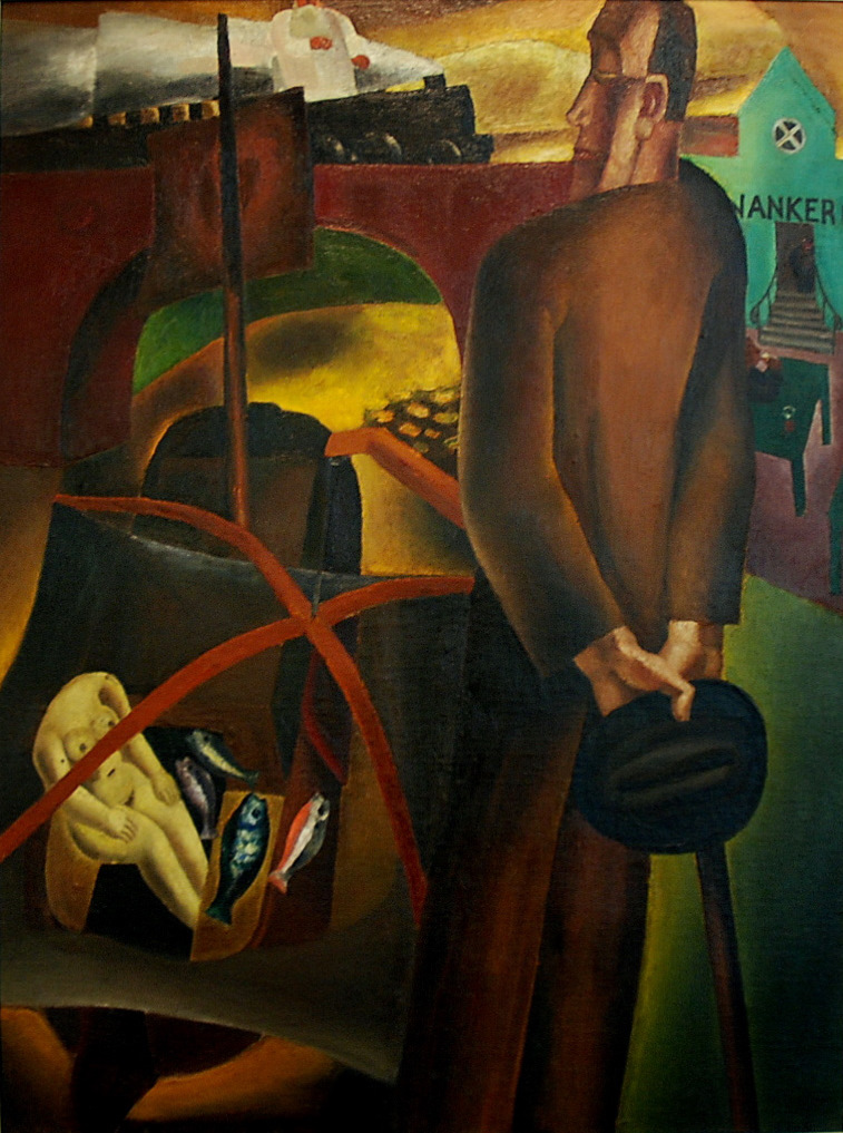 Frits Van den Berghe (1883-1939) - Eeuwige zwerver, vagebond - in het Kunstmuseum aan Zee te Oostende, België